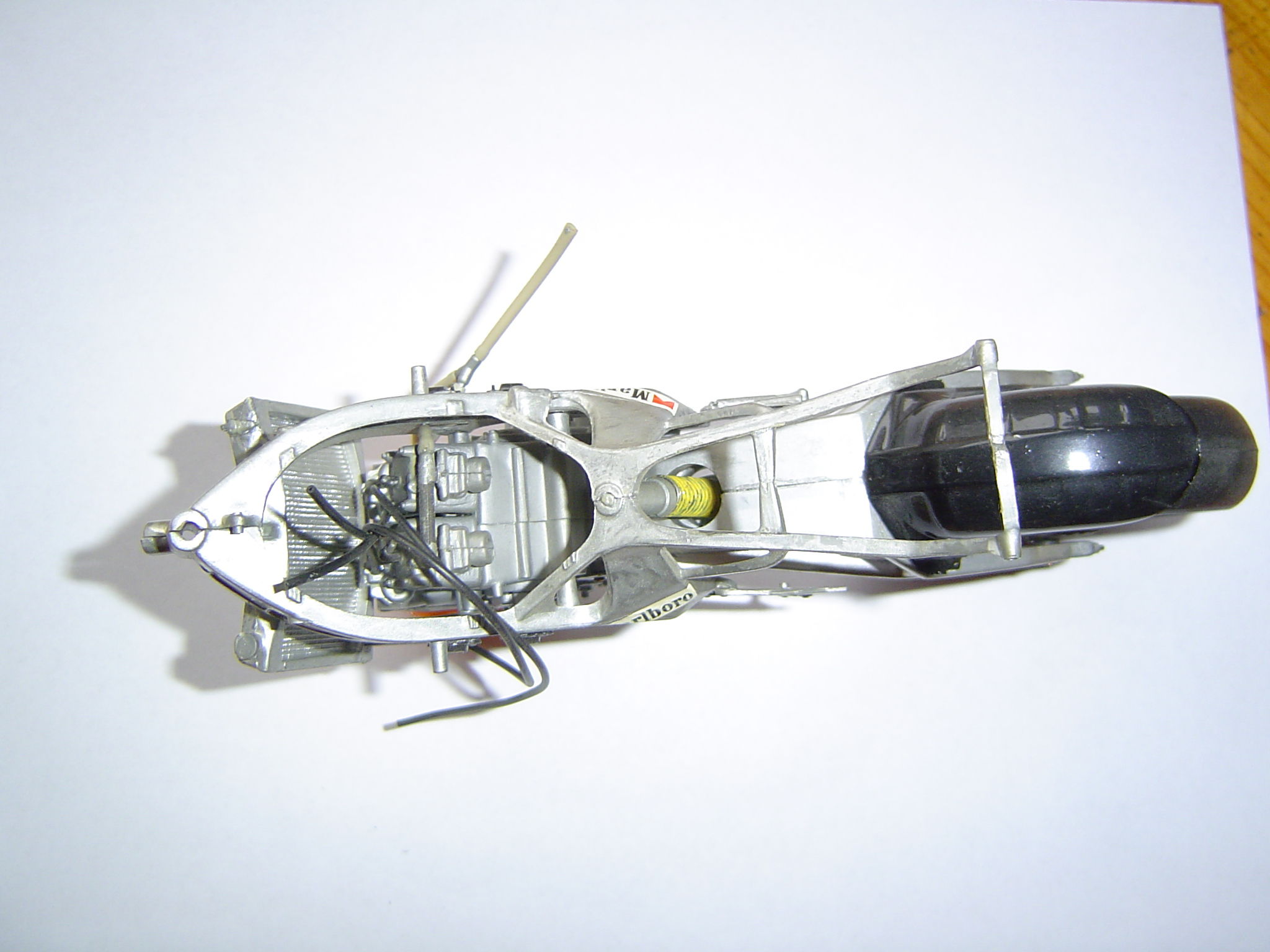 modellino motociclistico, con telaio bitrave perimetrale.